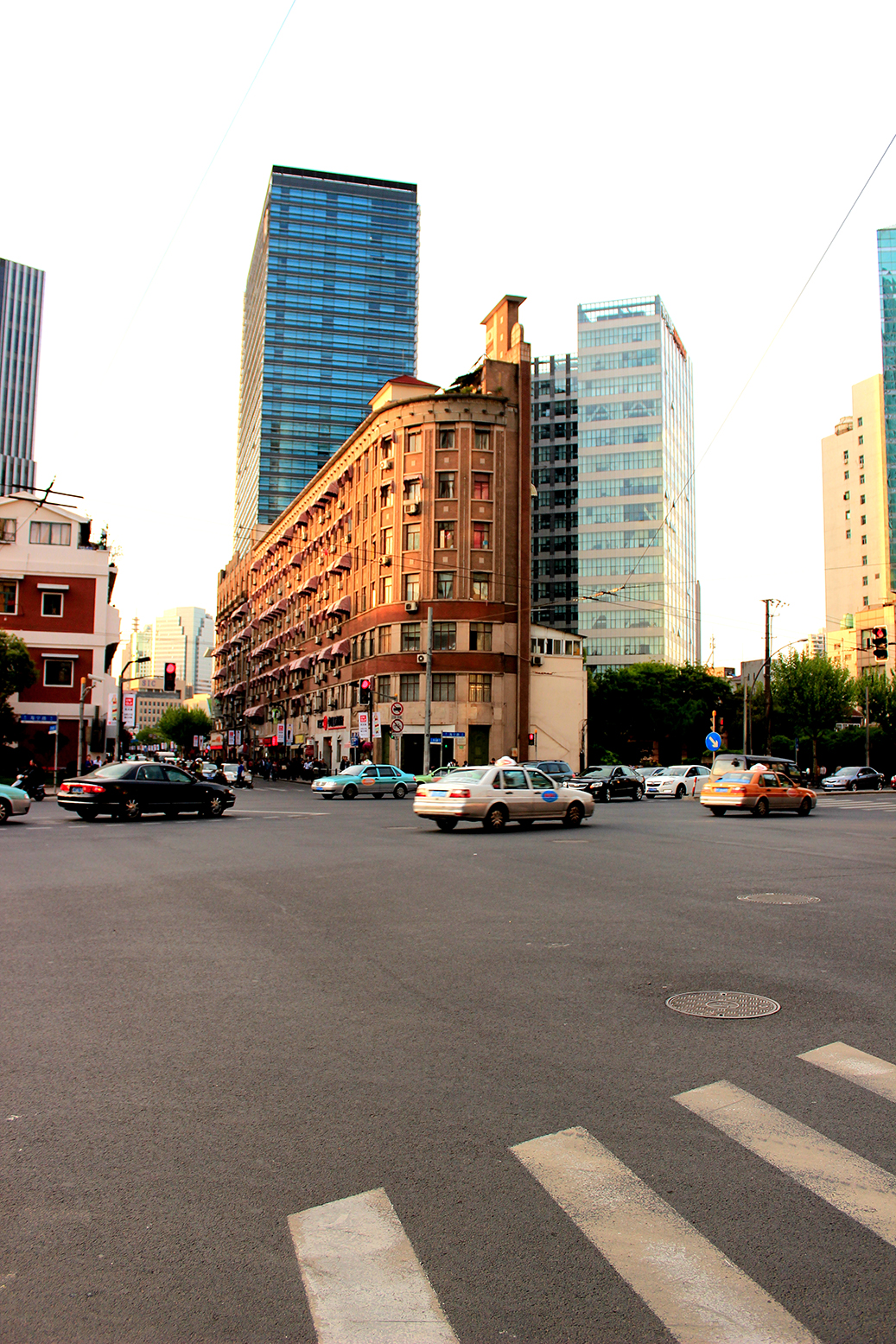 四川路海宁路路口的虹口大楼